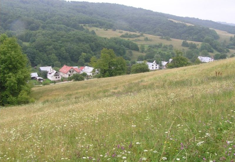 Celkový pohľad